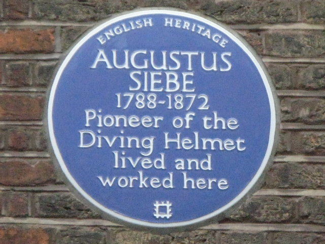 Plaque re Augustus Siebe, Denmark Street, WC2